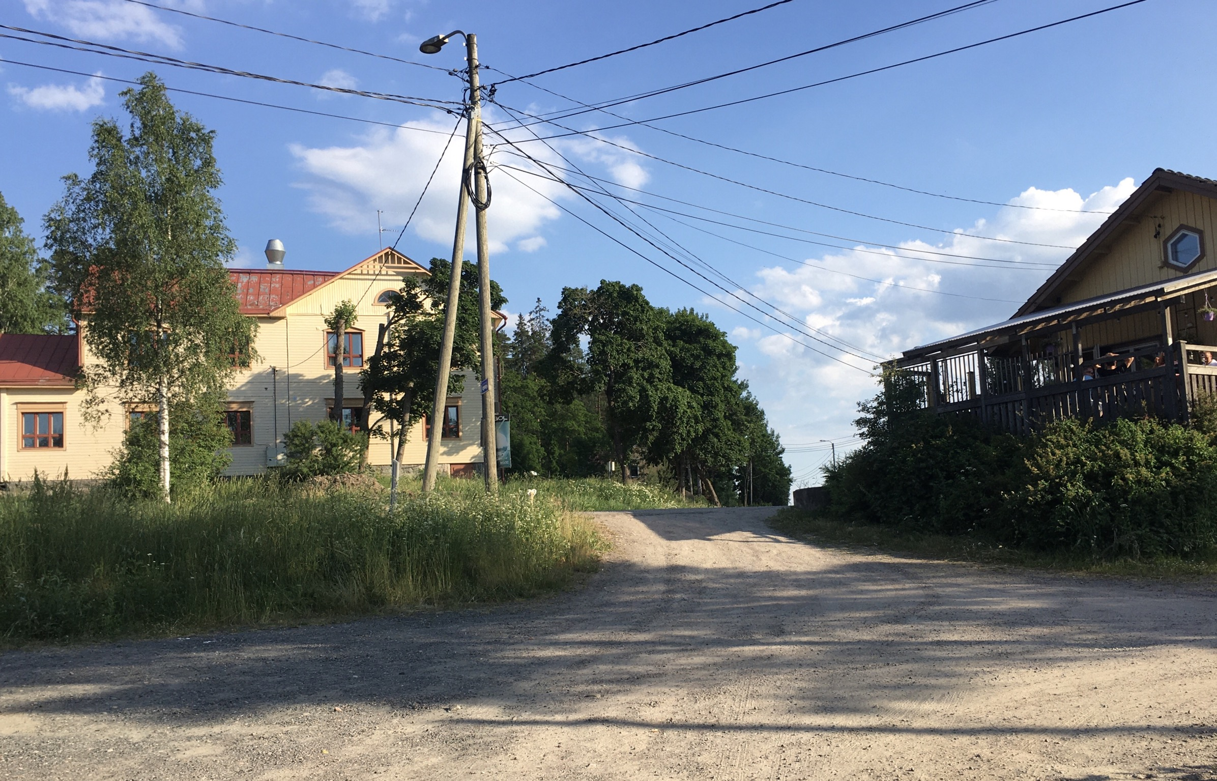 Numminen Mäntsälä baarin takapiha